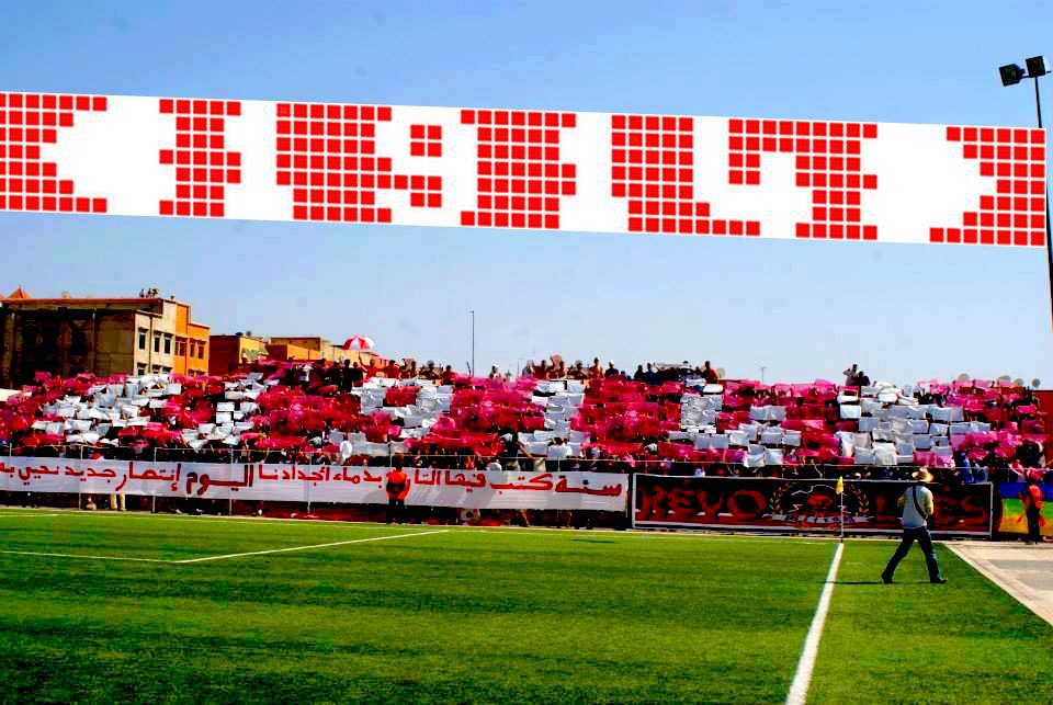 Ultras Revoltes